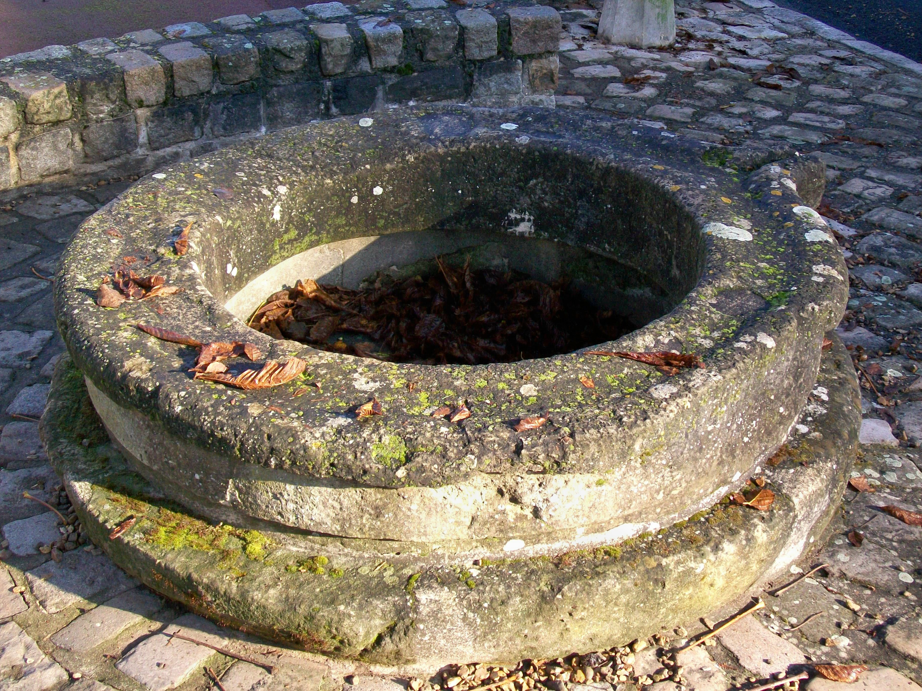 Margelle d'un puits du début du XVe siècle, rénovée en 1989 et exposée sur la place du Calvaire.